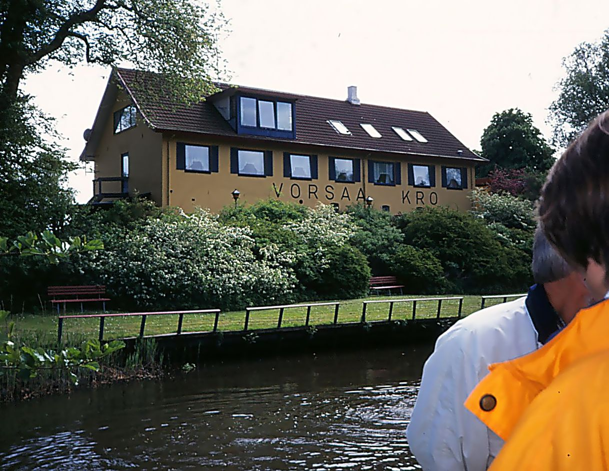 Sejlads på Voers Å i Voerså. I baggrunden den nu nedbrændte Voersaa Kro